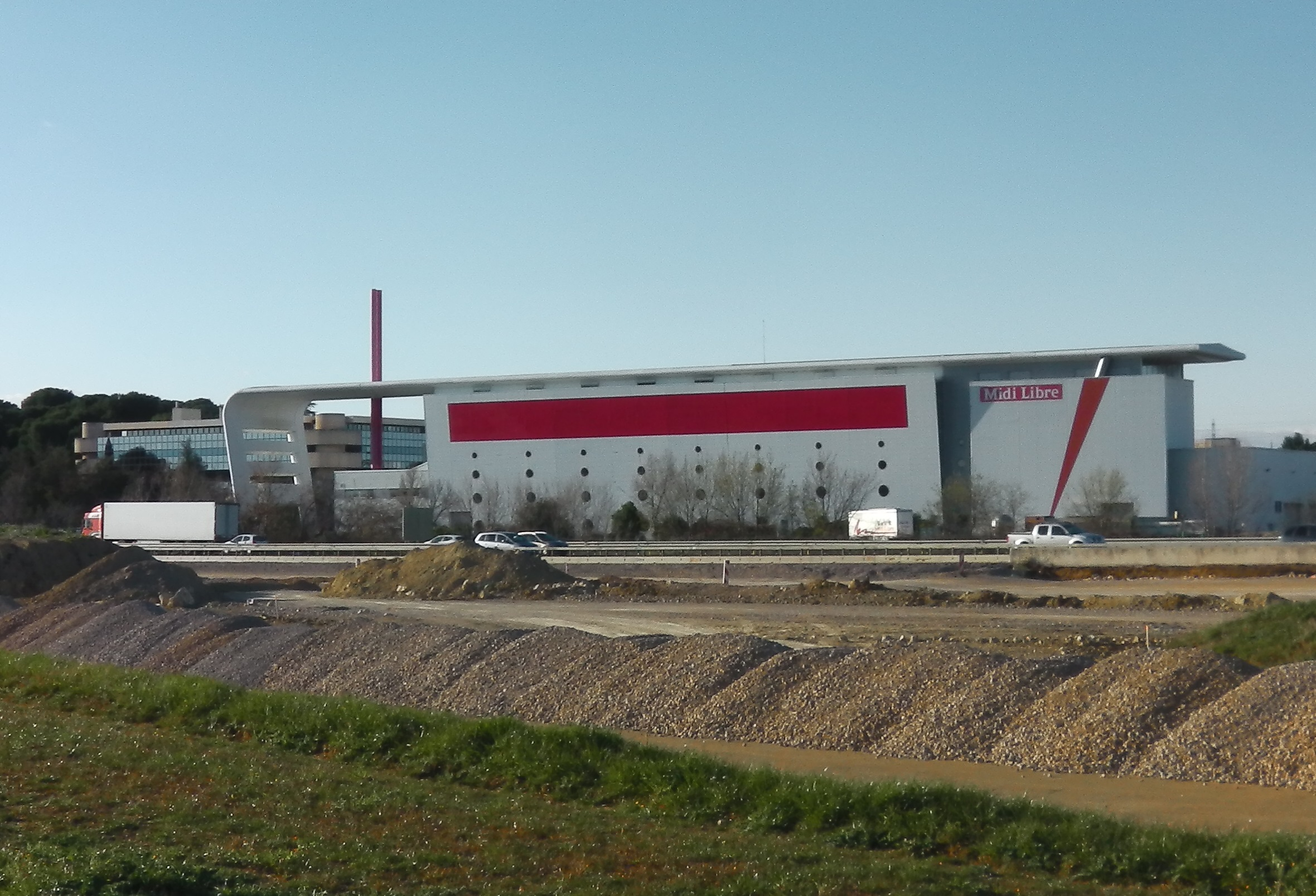 Le siège du journal "Midi Libre" à Saint-Jean-de-Védas (Hérault, France).